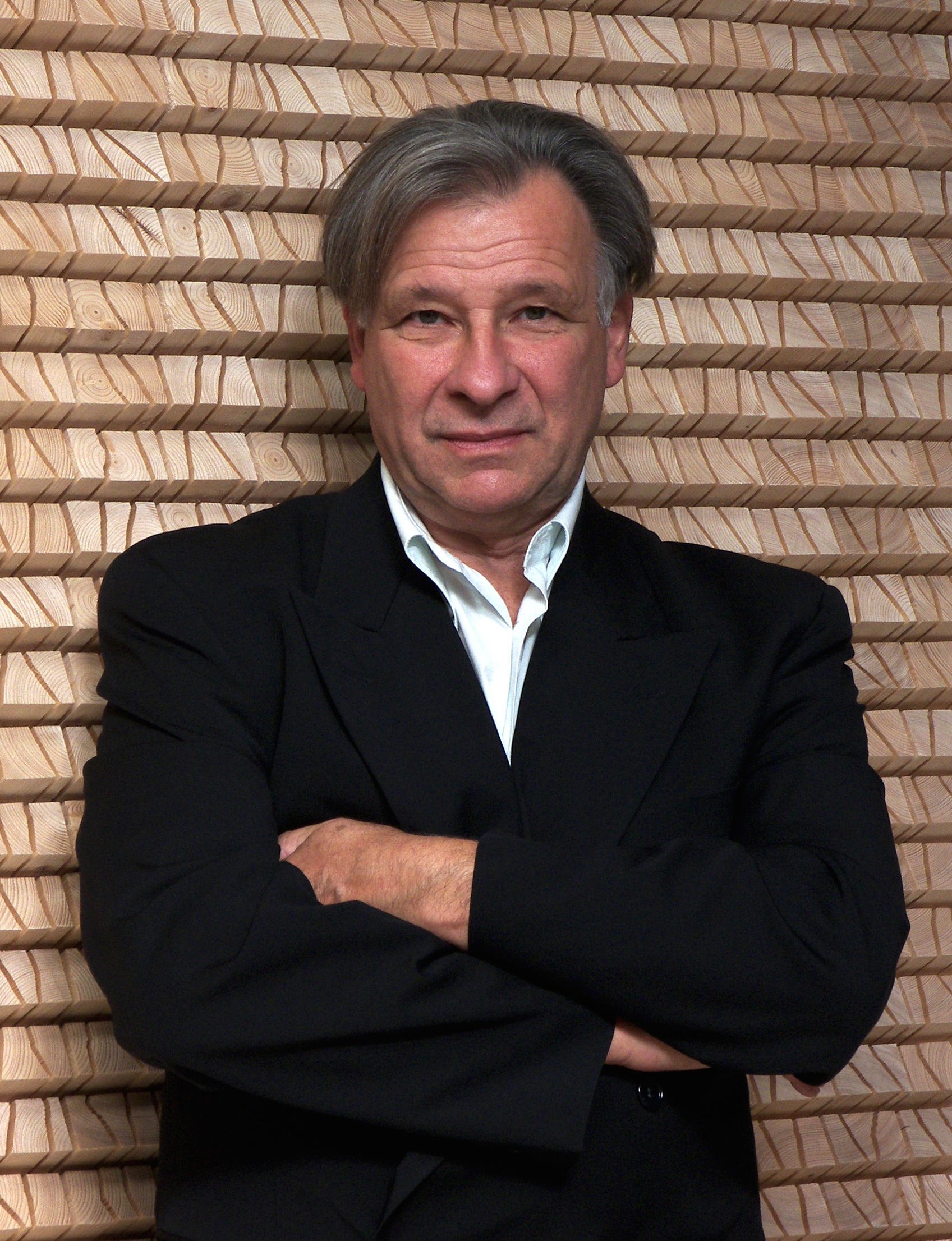 Foto Jan de Weryha